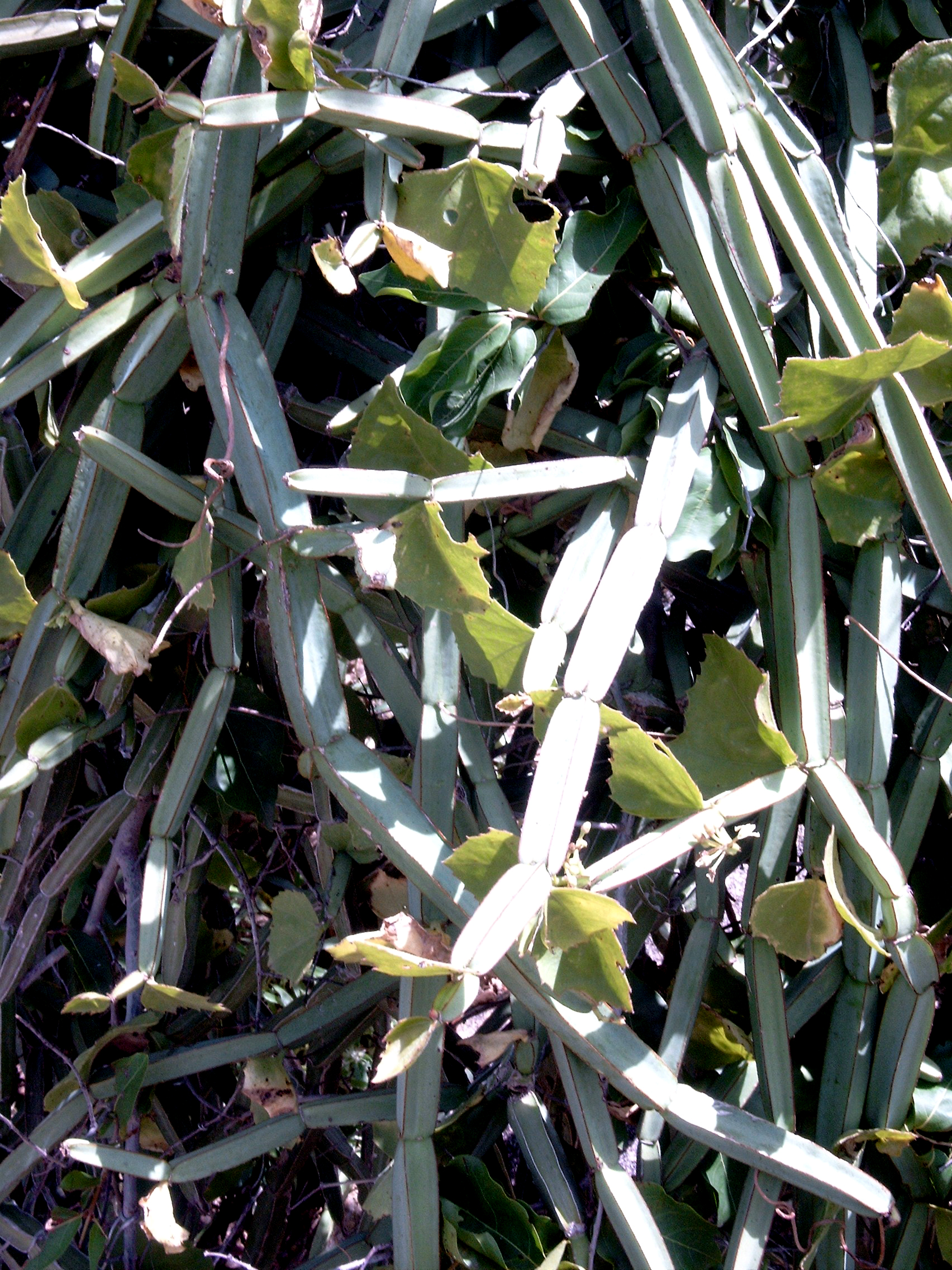 Cissus quadrangularis near Bogandé, Burkina Faso.